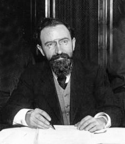 M. Chaumet sous-secrétaire d'Etat aux PTT : photographie de presse